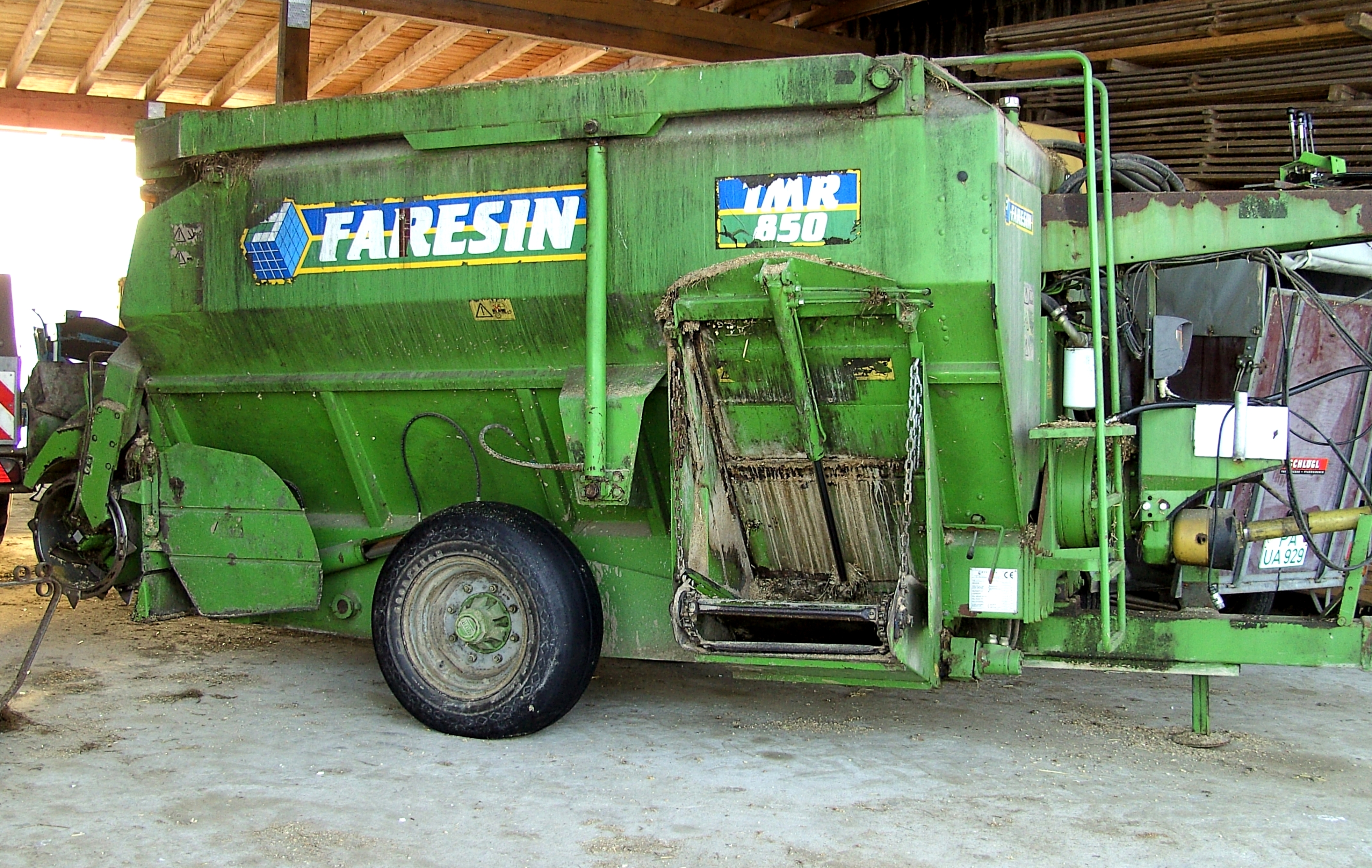 Faresin TMR 850 Futtermischer.